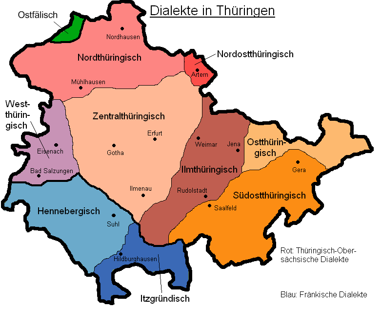 Verbreitungsgebiete der Dialekte in Thüringen. Quelle: selbst gezeichnet nach der Karte im „Kleinen Thüringer Wörterbuch“. Das Niederdeutsche im Norden fehlt in der Vorlage und wurde hinzugefügt.